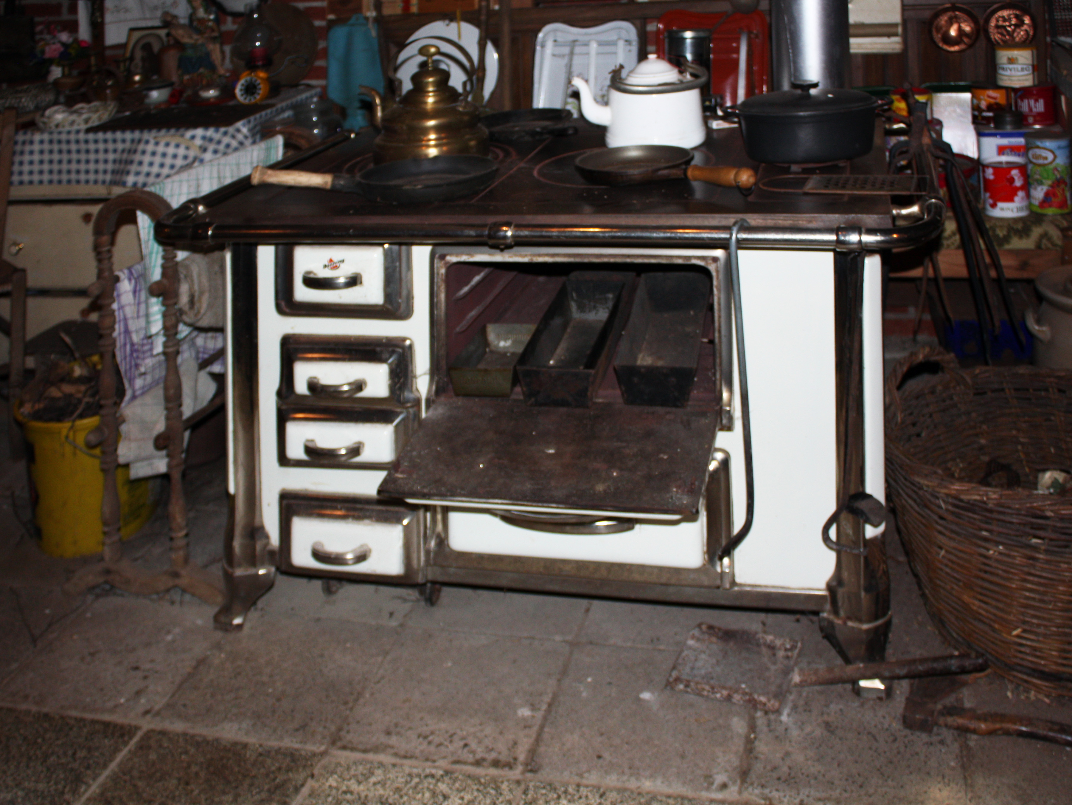 Bawinkel, alter Küchenherd. Sammlung H. Jaske